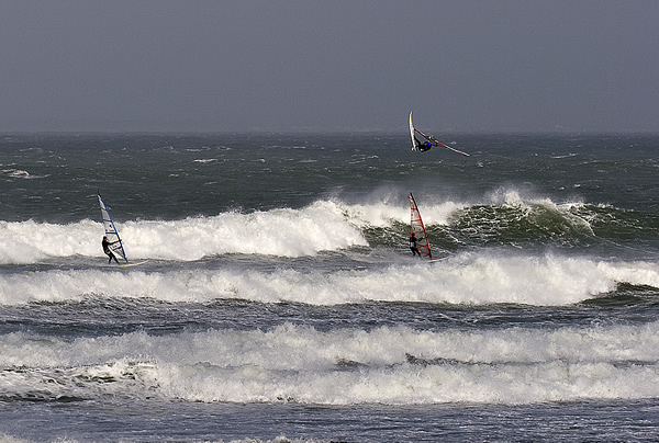 Diamond Head, spot de funboard, La Conche des Baleines - Île de Ré - Photo issue de ma banque d'images